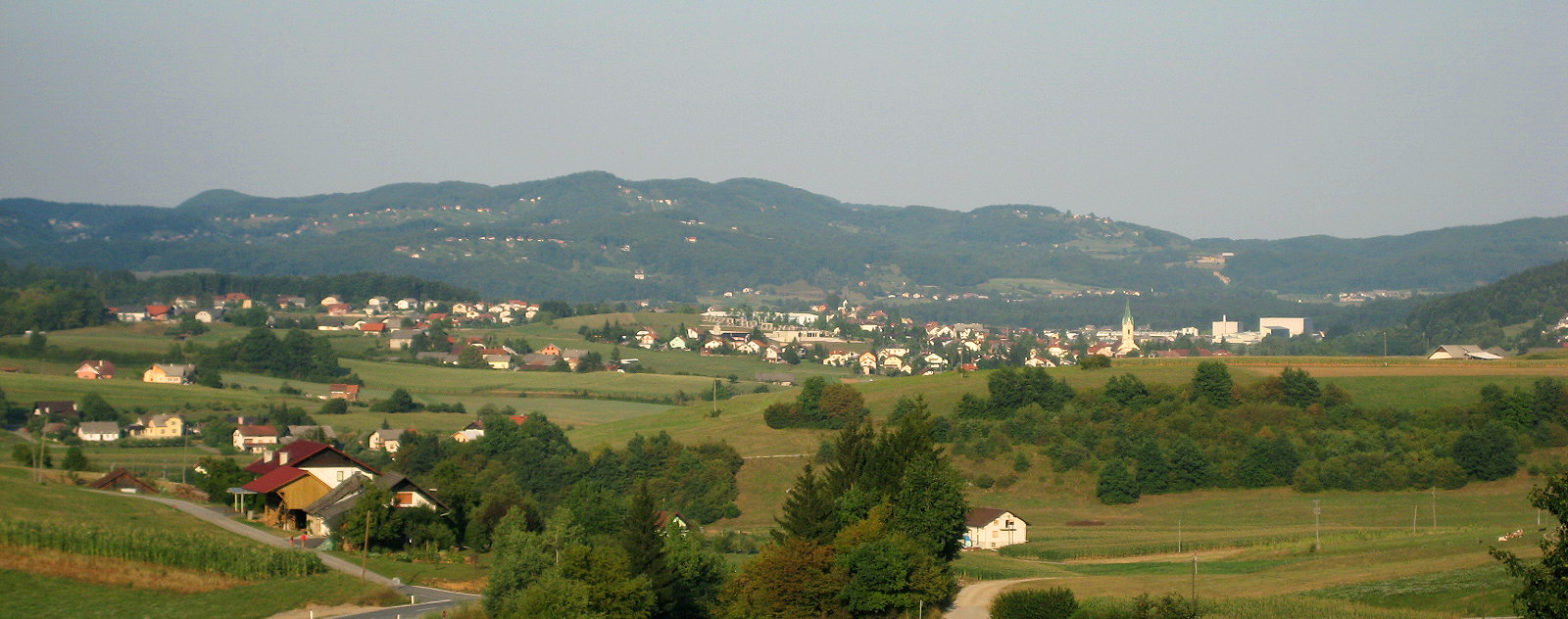 Trebnje, town in Slovenia